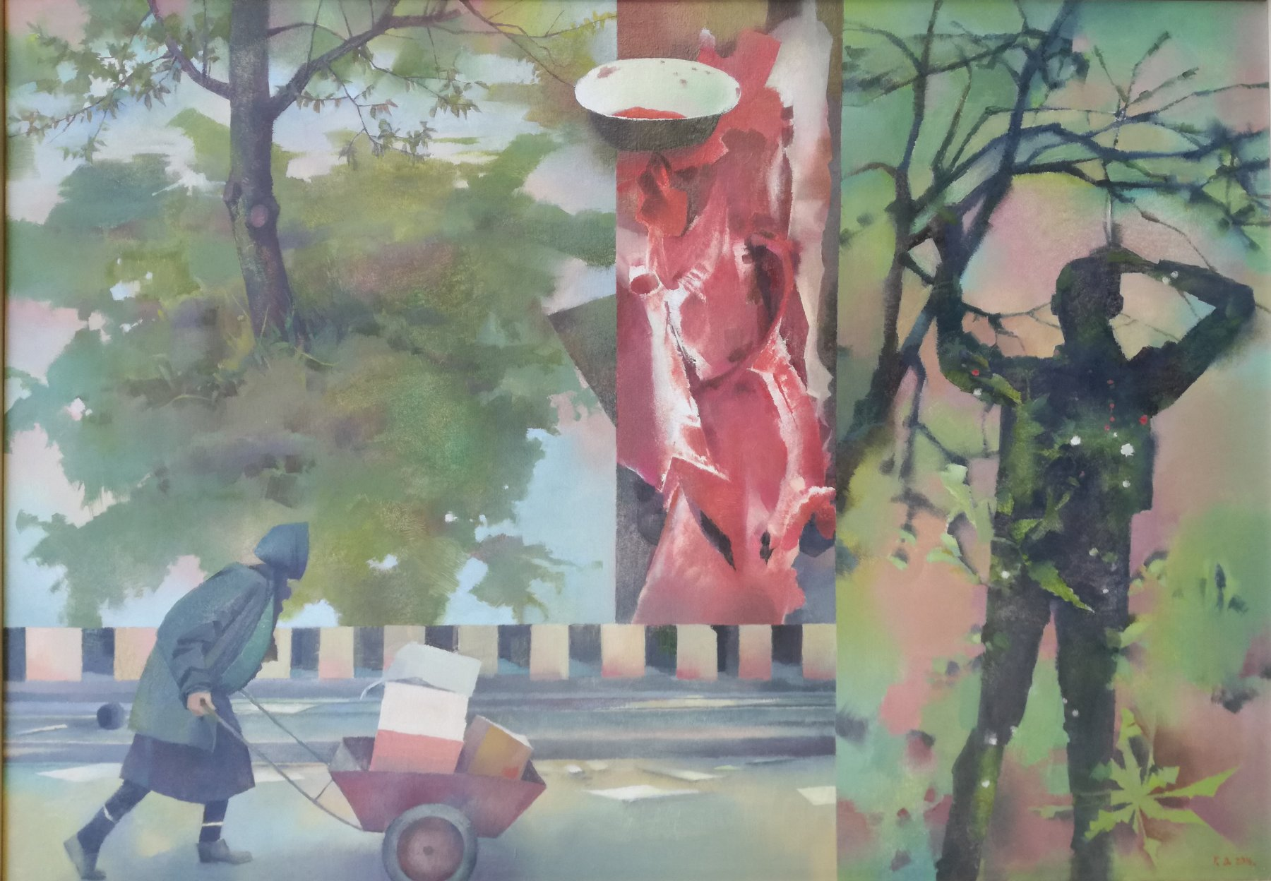 2016, Öl auf Leinwand, auf Platte, 70x100